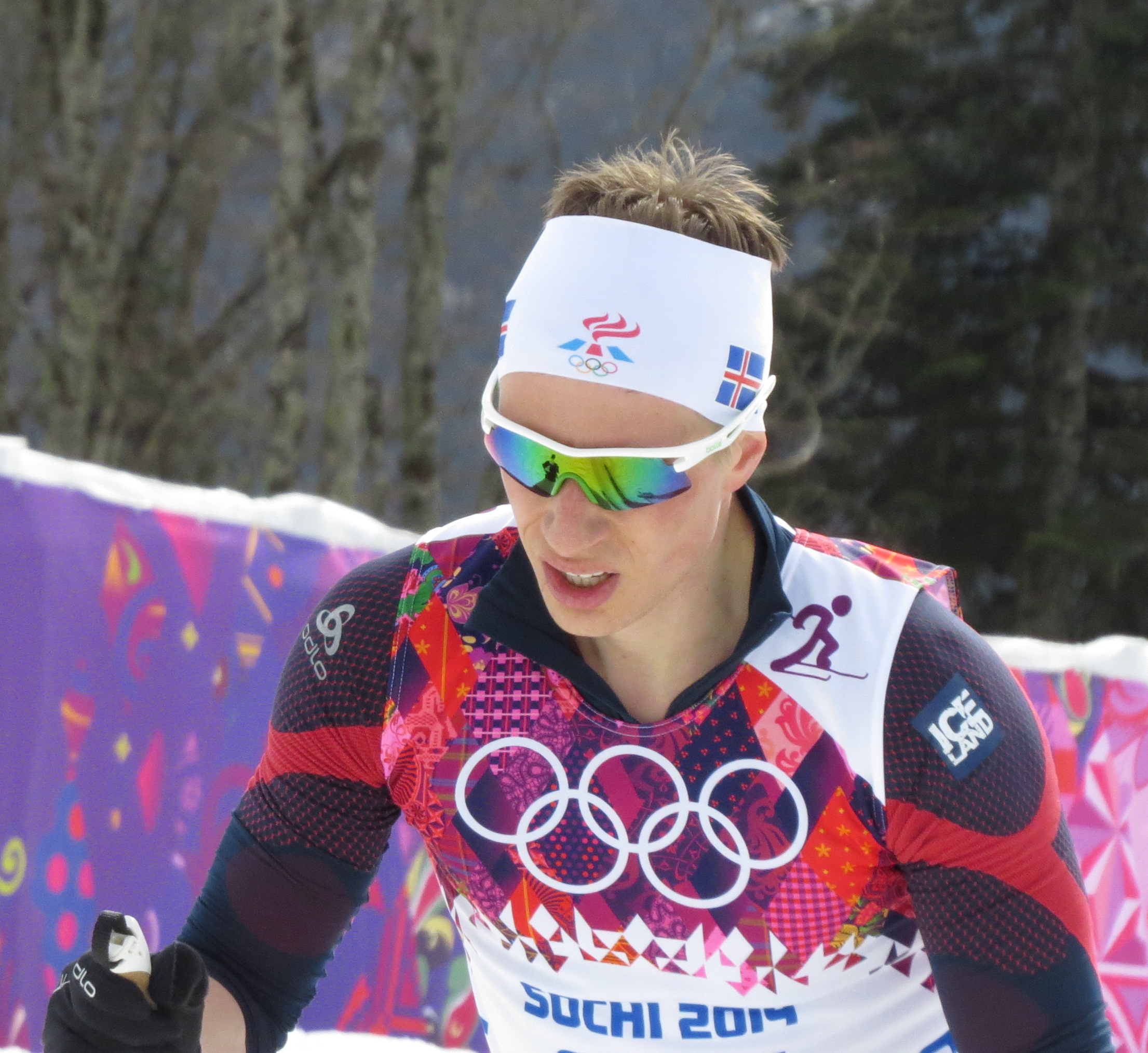 Лыжные гонки на зимних Олимпийских играх 2014 — 15 км классическим стилем (мужчины)